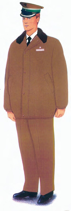 Ubiór galowy funkcjonariuszy noszących umundurowanie Wojsk Lądowych z kurtką służbową Straży Granicznej koloru khaki z podpinką oraz z czapką garnizonową